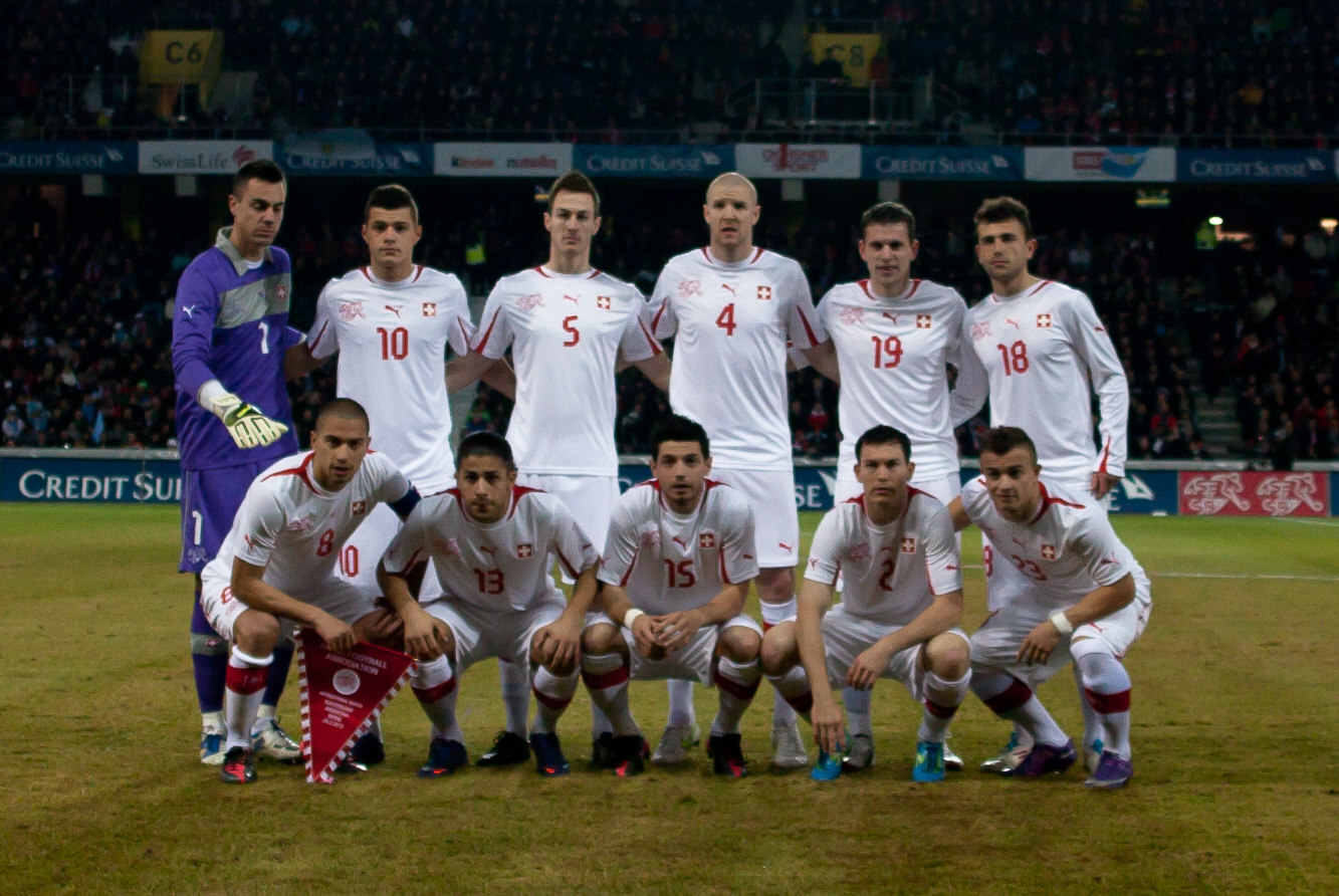 Suisse vs Argentine - équipe de Suisse